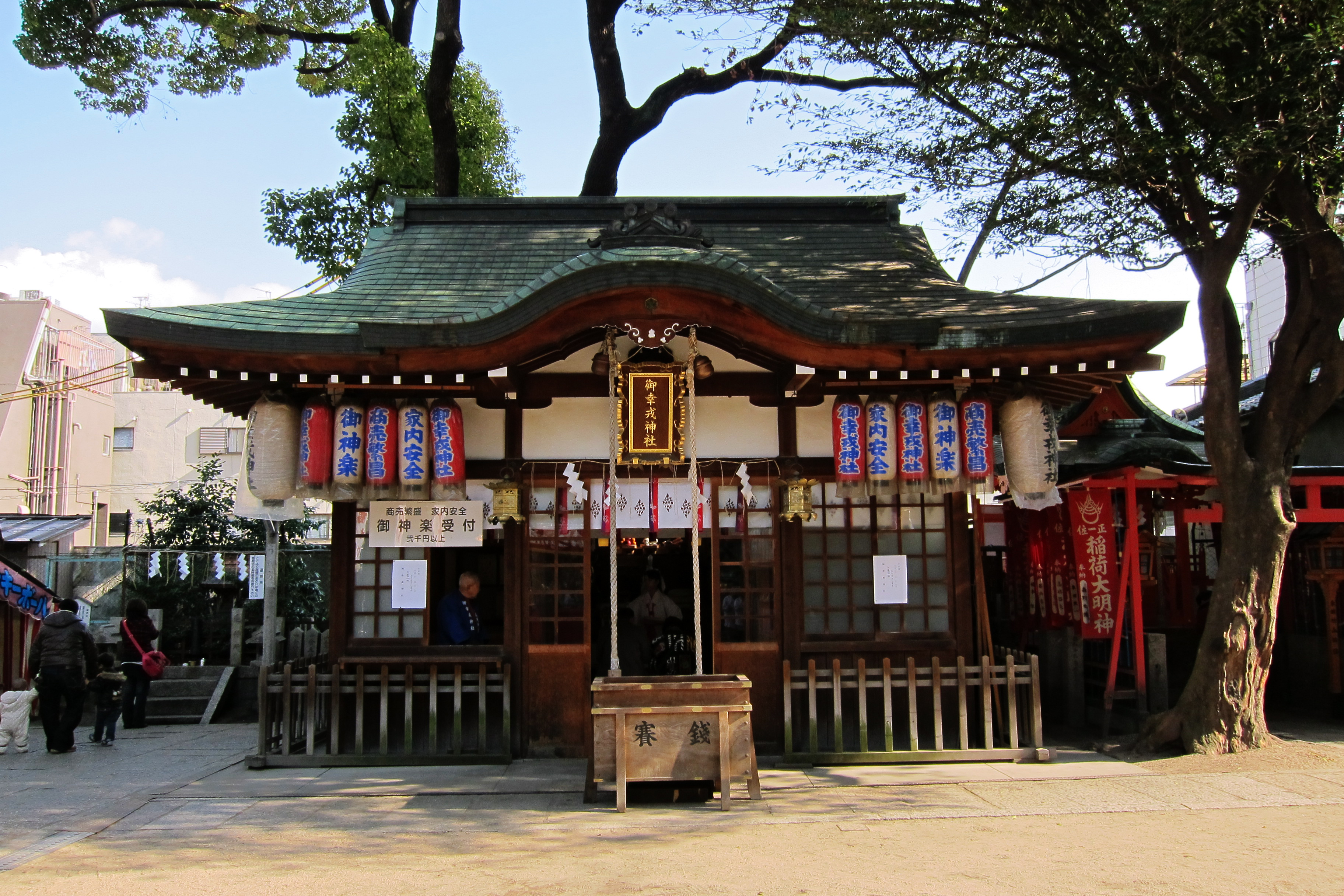 Miyukimori-tenjin-gu (御幸森天神宮) at Osaka City, Japan.